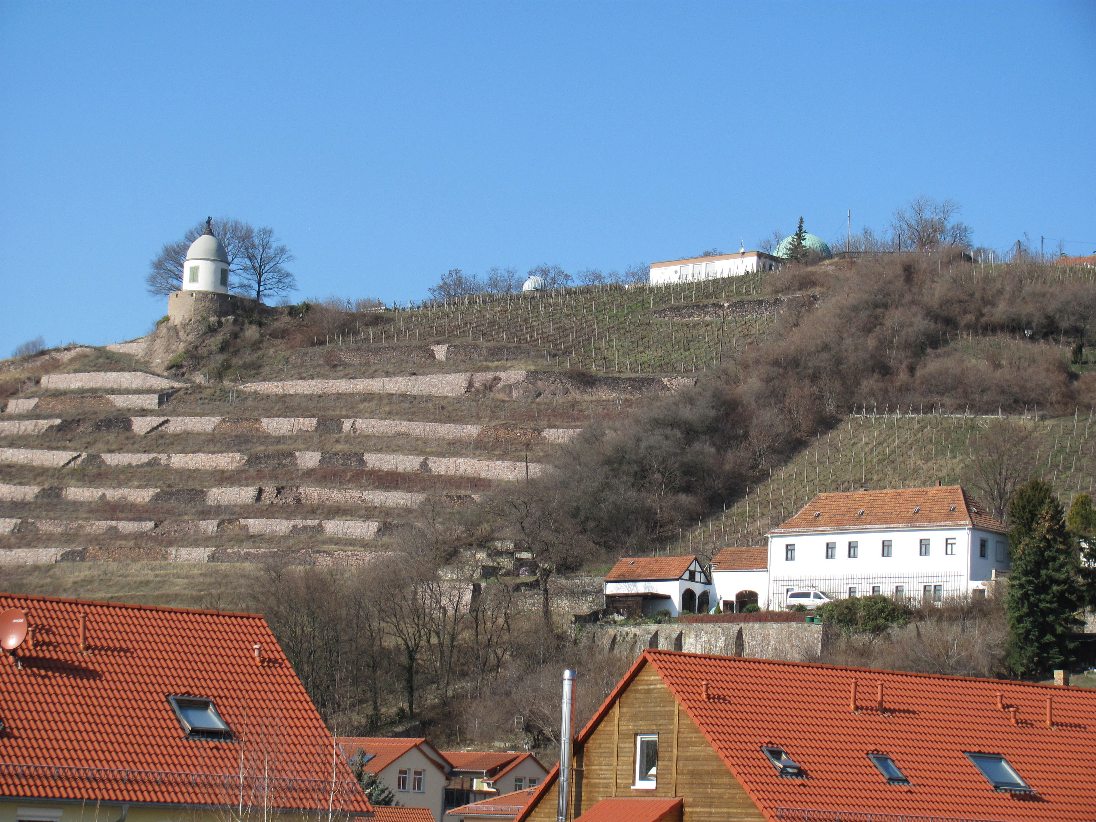 Radebeul, Jacobstein Volkssternwarte Radebeul Haus Nitzsche